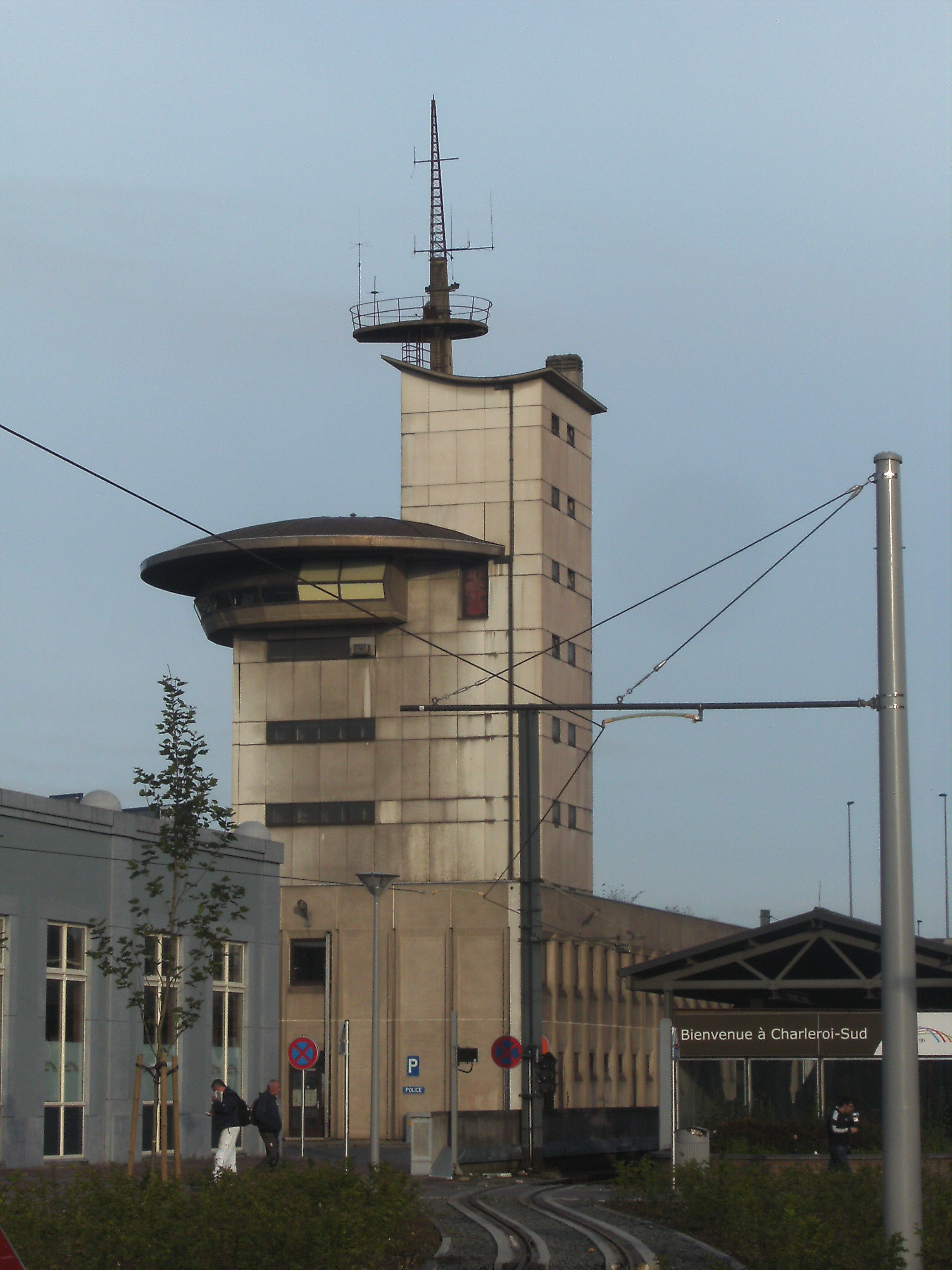 Charleroi (Belgique) - gare de Charleroi-Sud - tour de signalisation.